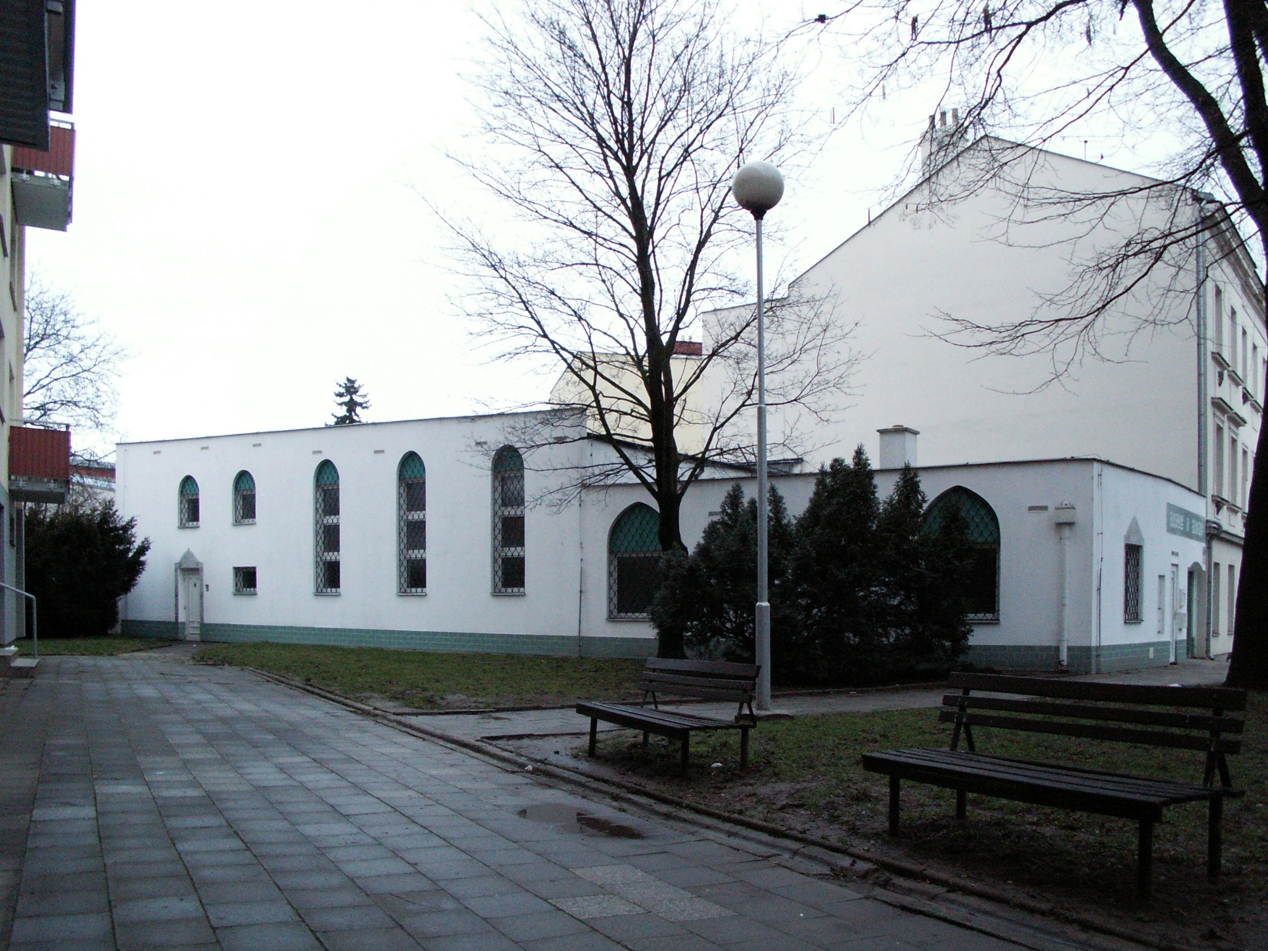 Brno Mosque.